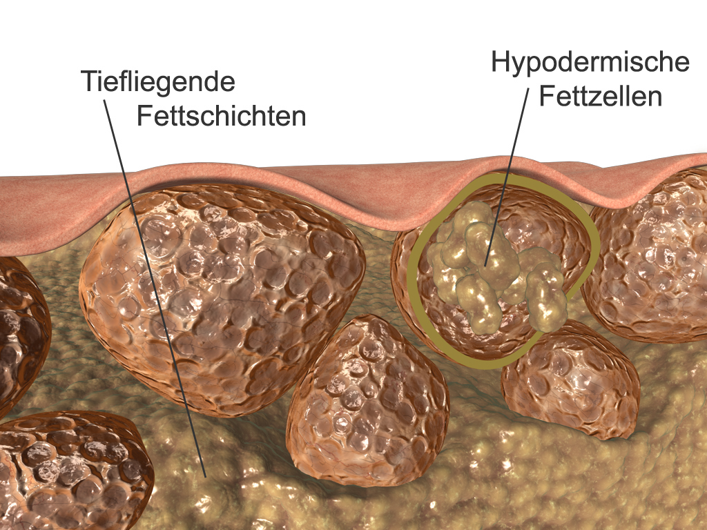 Das Bild zeigt einen Querschnitt durch die Haut bei Cellulite.